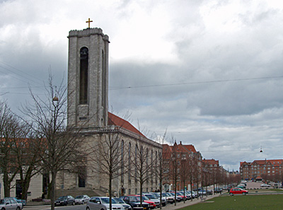 Sankt Lukas Kirke Århus Kommune, Denmark